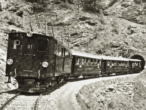 Lokomotive Ge 6/6 81 der Berninabahn (BB), heute Rhätische Bahn, vor neuen Speisewagen der Mitropa vor dem Bernina-Express 1928.